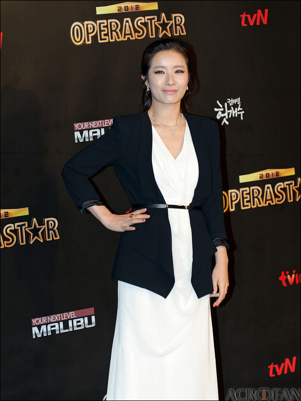 tvN 오페라스타 2012 제작 발표회에 참여한 박기영